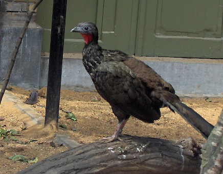 Species Penelope jacquacu Family Cracidae